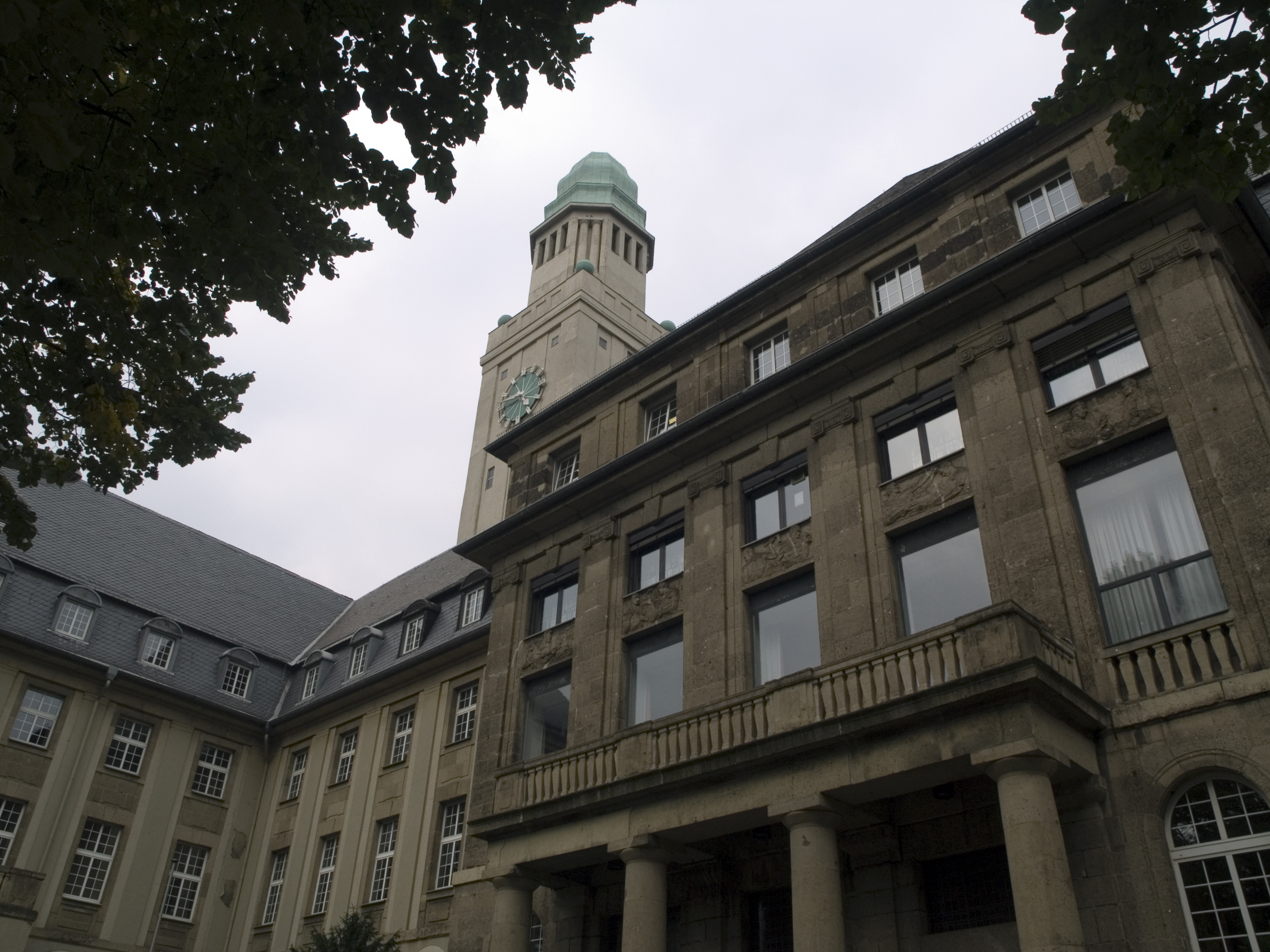 Северный Рейн - Вестфалия, Гельзенкирхен - ратуша района Бюр